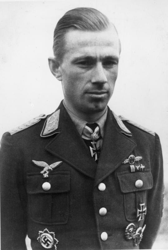 Major Helmut Lent Unser erfolgreichster Nachtjäger. Eichenlaubträger Major Lent ist mit mehr als 50 Nachtjagdsiegen Deutschlands erfolgsreichster Nachtjäger.